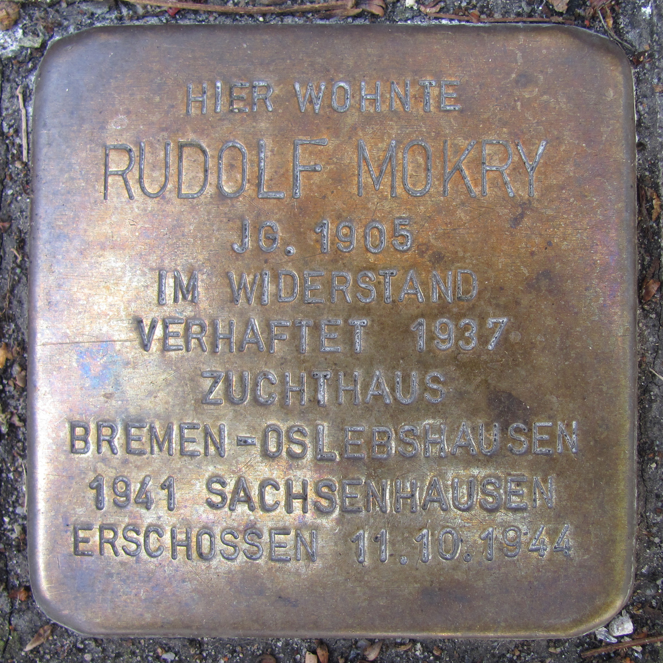 Stolperstein für Rudolf Mokry vor dem Haus Otterhaken 5